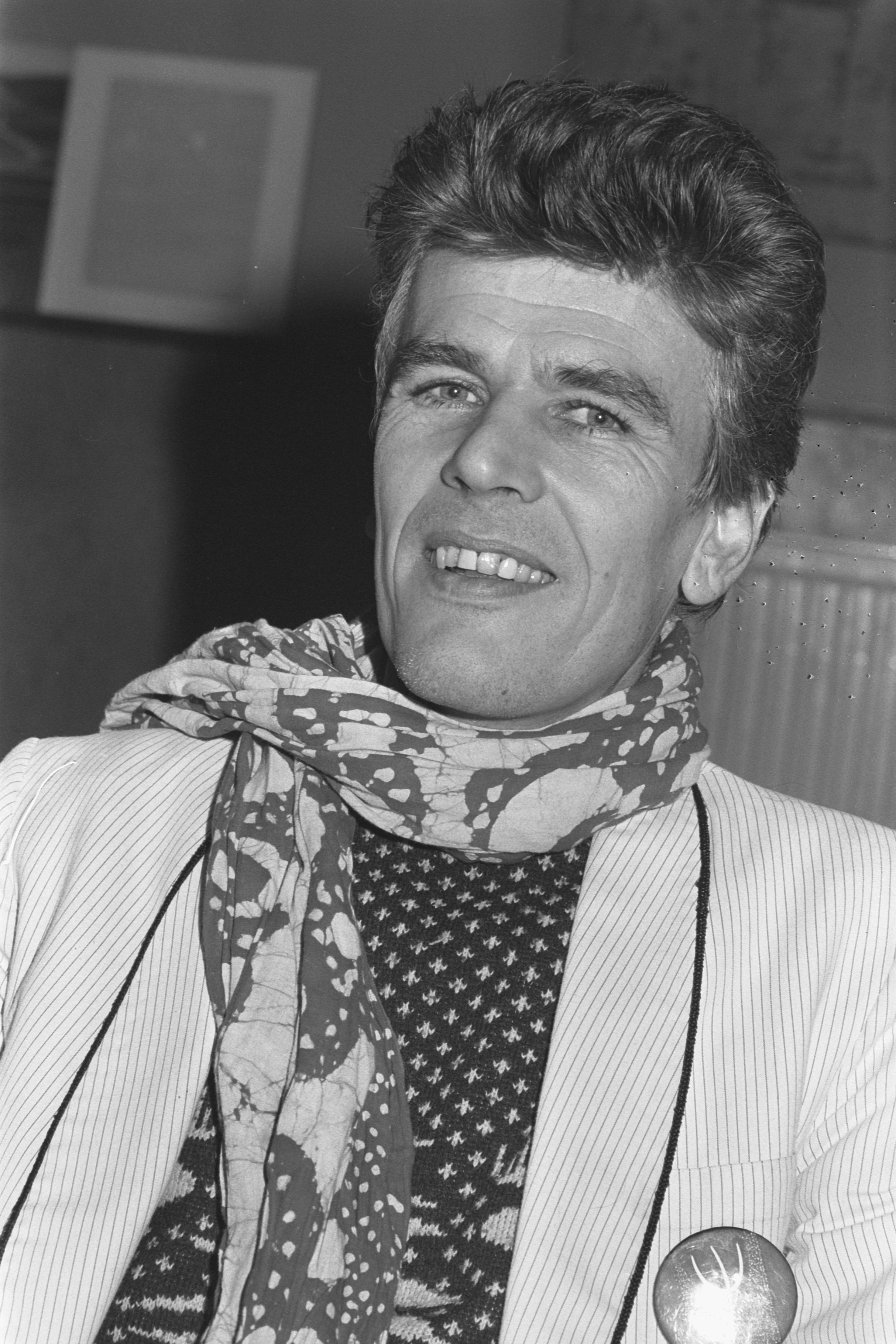 Collectie / Archief : Fotocollectie Anefo Reportage / Serie : [ onbekend ] Beschrijving : Hans Plomp , dichter Datum : 7 januari 1987 Trefwoorden : dichters, portretten Persoonsnaam : Plomp, Hans Fotograaf : Bogaerts, Rob / Anefo Auteursrechthebbende : Nationaal Archief Materiaalsoort : Negatief (zwart/wit) Nummer archiefinventaris : bekijk toegang 2.24.01.05 Bestanddeelnummer : 933-8570